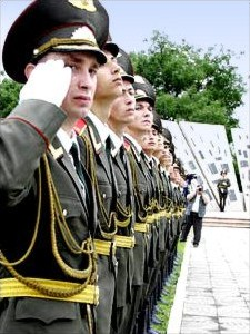 Transnistrian soldiers